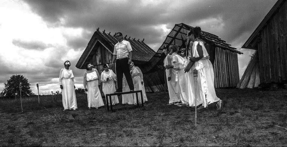 Teater Karakteri lavastus “Kükloop”